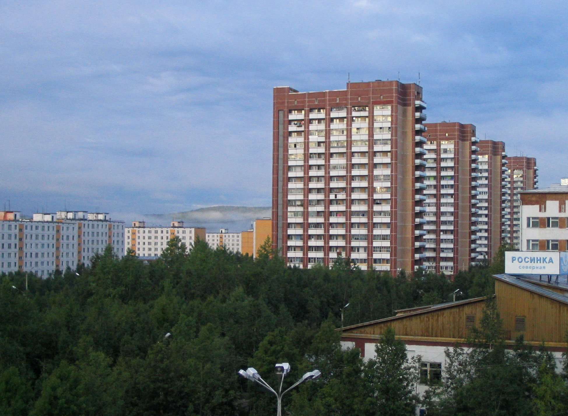 Tynda, Siberia. RU: Тында, Амурская область